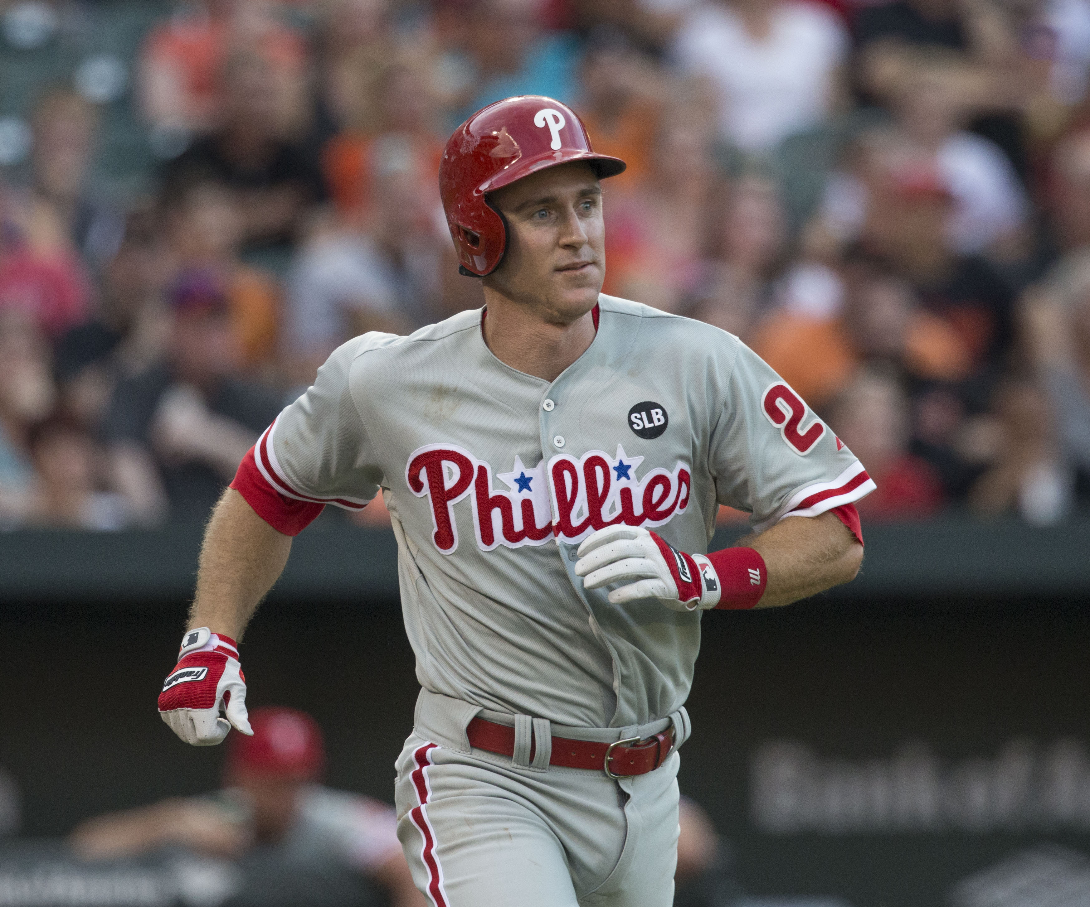 Phillies at Orioles 6/16/15